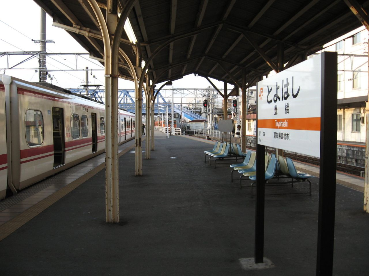 JR東海の駅名板だが、名鉄の電車が停車している(2006.12.27に投稿者が撮影)